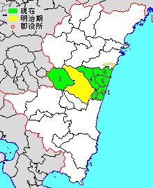 宮崎県児湯郡の範囲